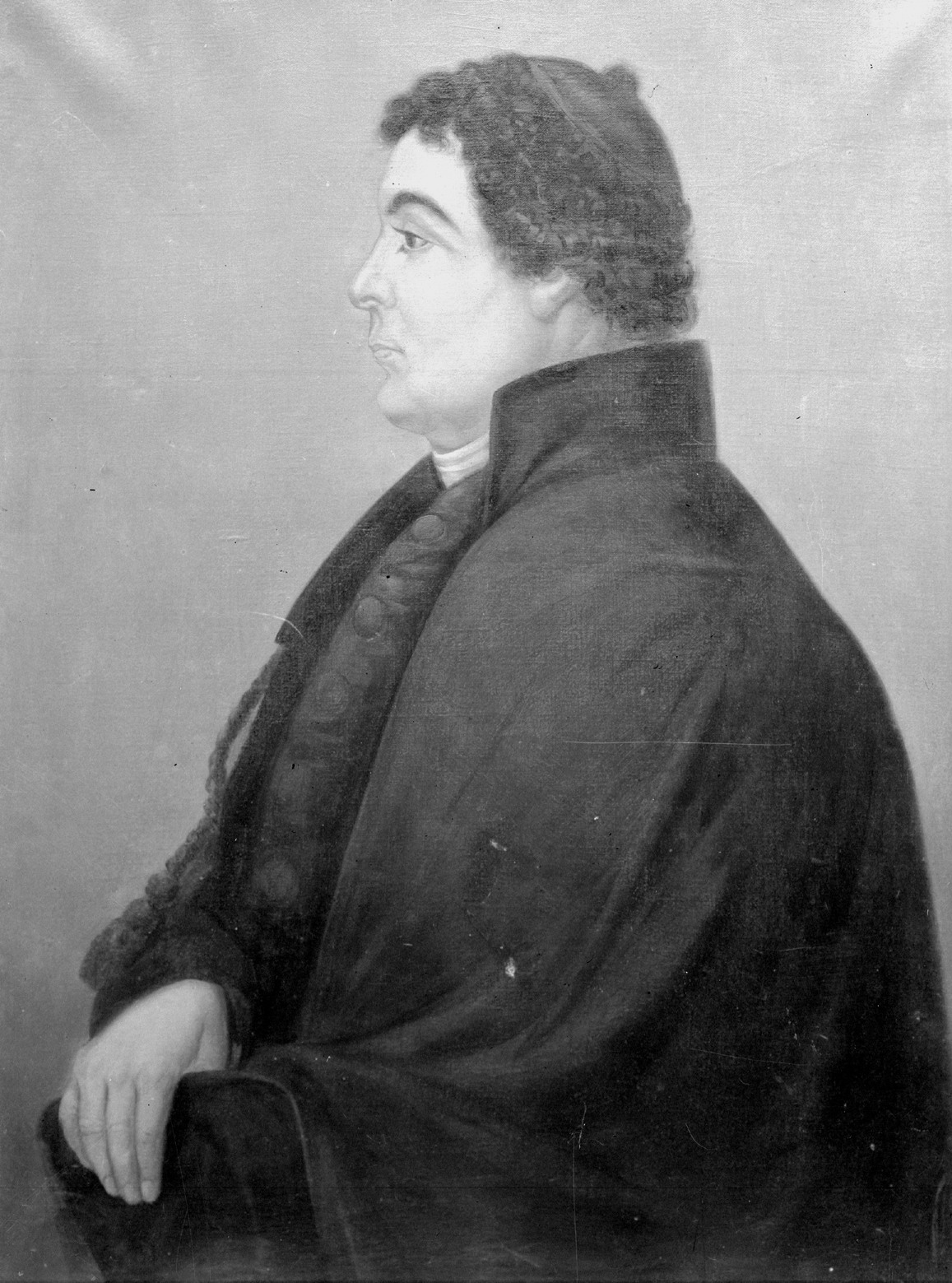 Retrato del político, naturalista, botánico y religioso uruguayo, Dámaso Antonio Larrañaga (1771 – 1848).